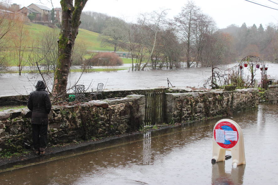 La Vienne à Saint Léonard de Noblat, sort de son lit l'hiver 2017 au quartier ponticaud de Noblat.